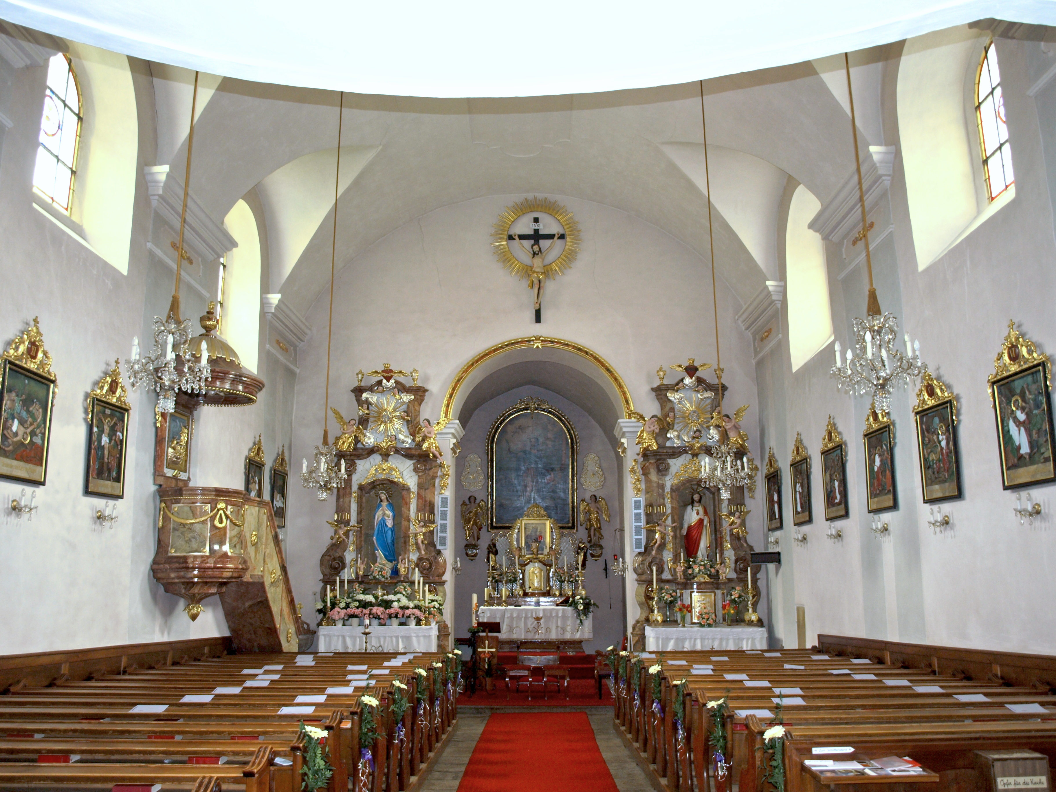 Kath. Pfarrkirche hll. Bartholomäus und Thomas